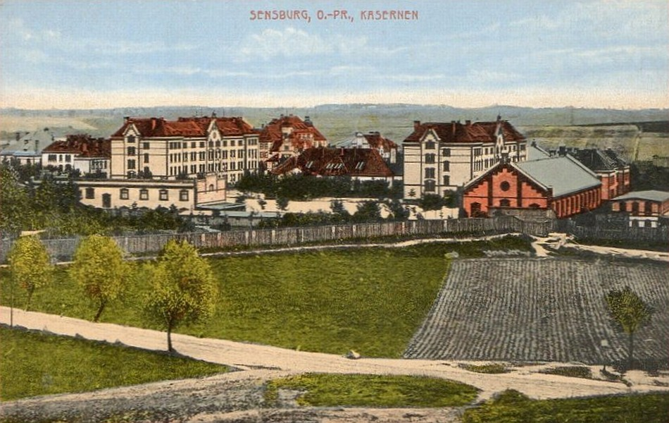 Kaserne in Sensburg, erst genutzt vom Infanterie-Regiments Nr. 146, dann durch Infanterie-Regiment Nr. 151, vor 1914 gelaufene Postkarte